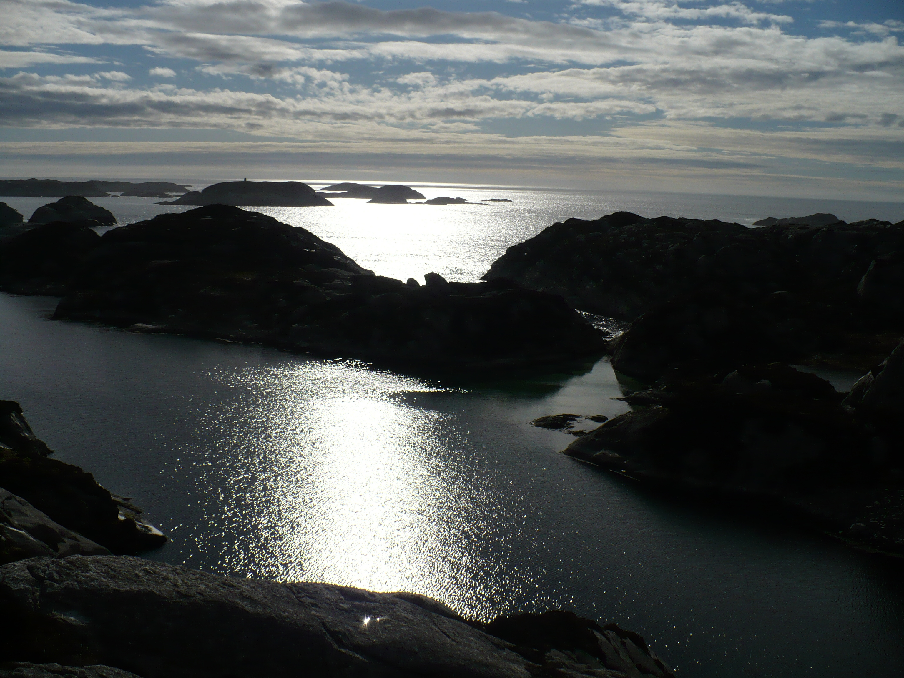 Biletet visar landskapet ut mot havet, på Katla, som var ein tidlegare småbruksgard på øya Goddo.